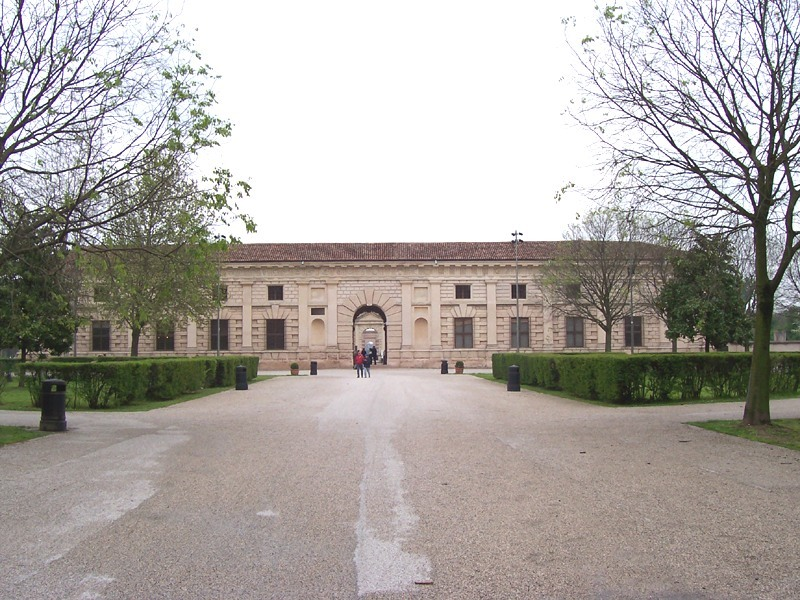 Mantova - Palazzo Te